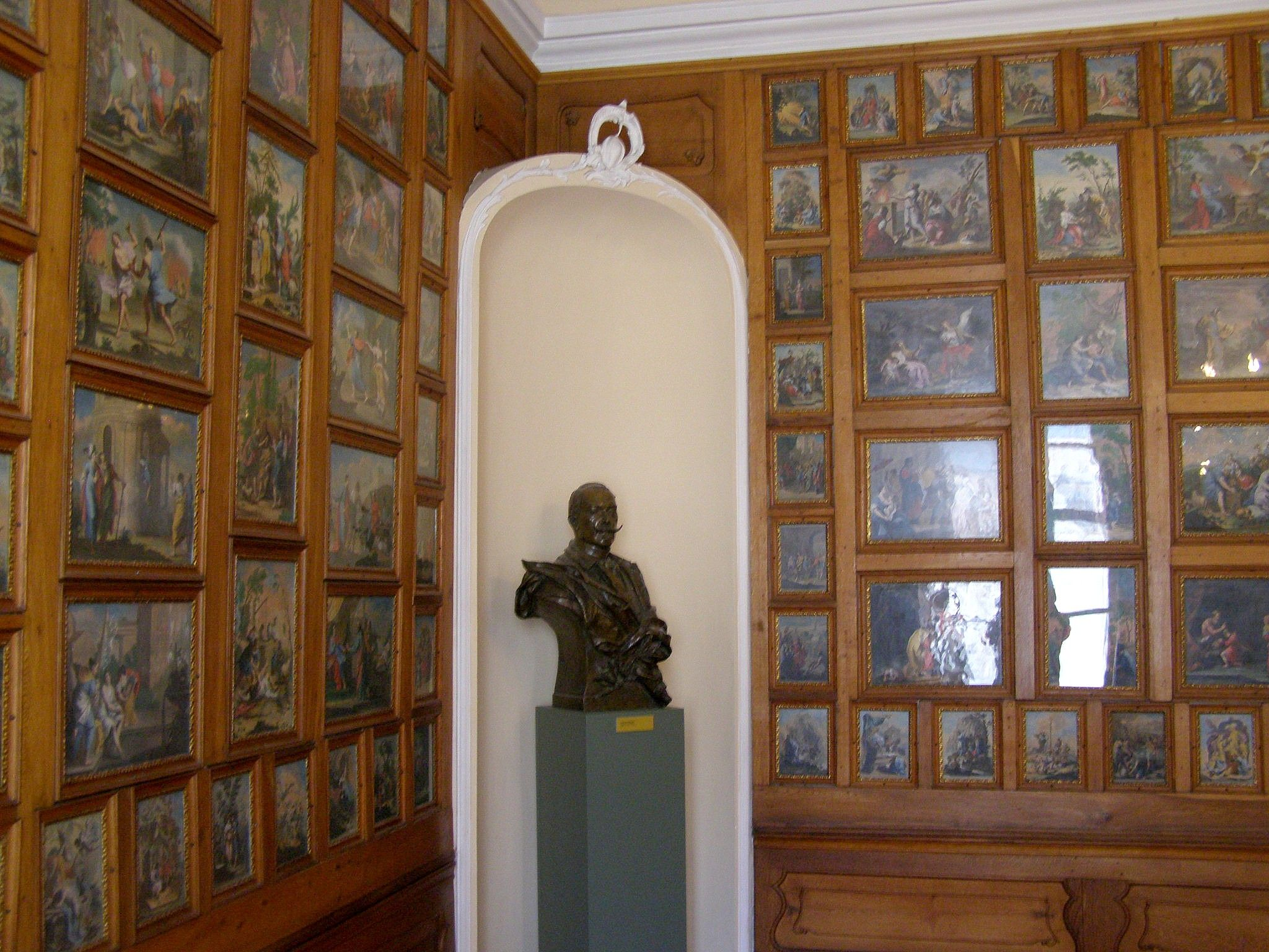 Interiér miestnosti s dreveným obkladom z pôvodného zariadenia paláca